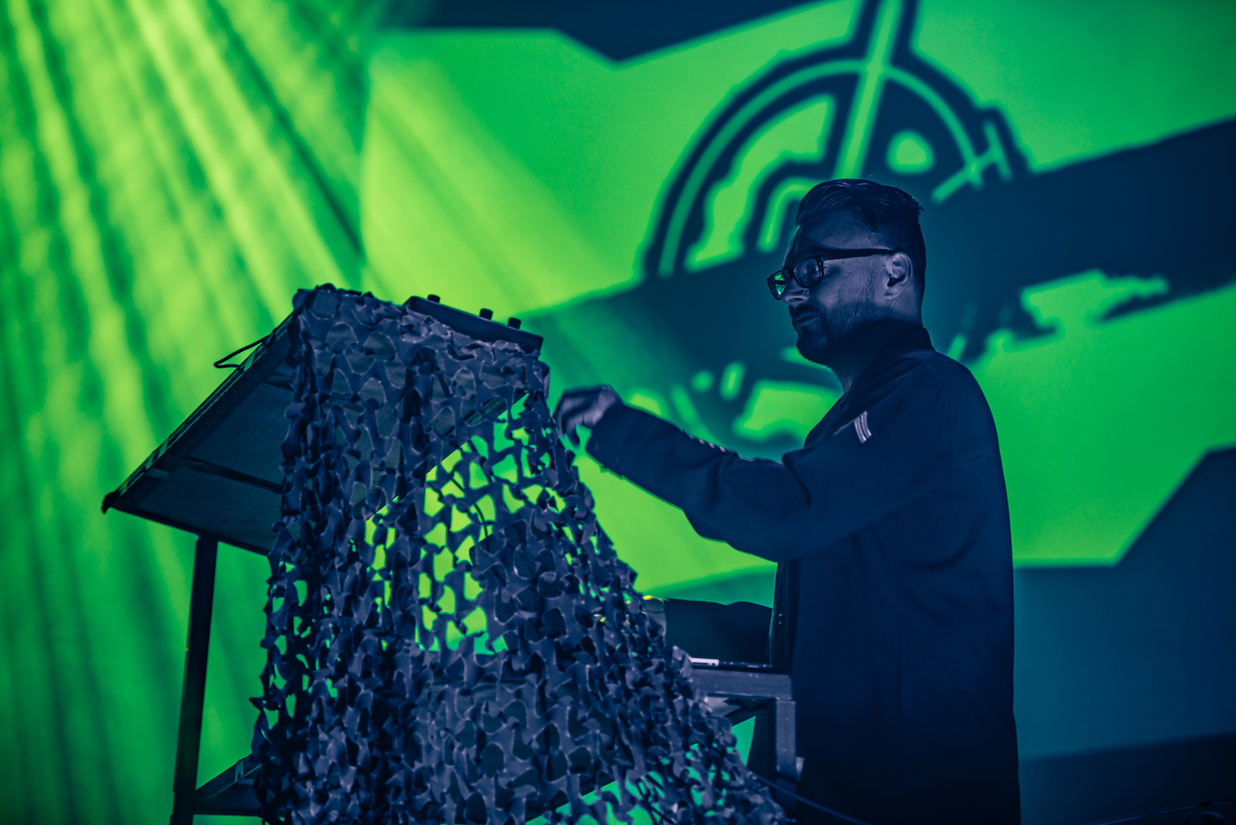 E-Tropolis Festival 2016; Oberhausen Turbinenhalle - Frontline Assembly